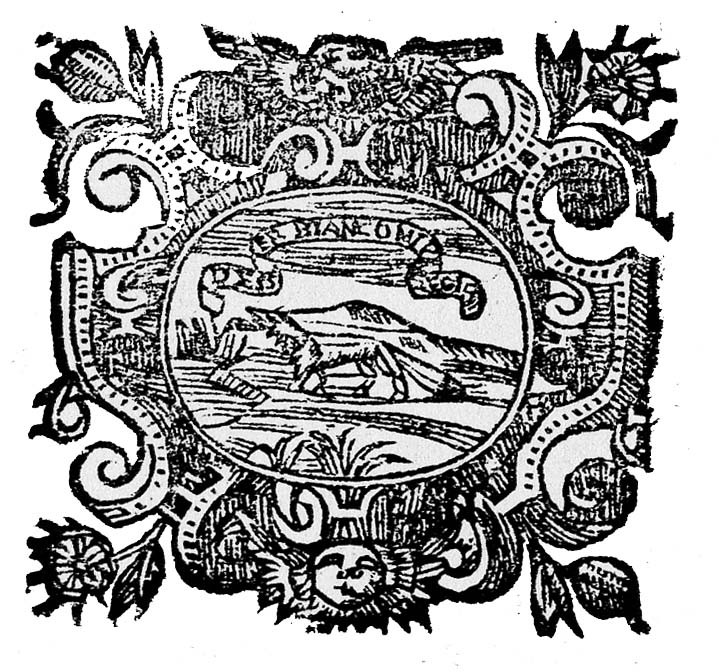 MAR.T.E. U952 Un lupo con un paesaggio sullo sfondo. In una cornice figurata. Motto su un nastro: D'esser bianco mi pregio. Parole chiave: DESSERBIAN LUPO Luogo: MESSINA Data: 1640 Dimensioni: 50x50 Iconclass: 25 F 23 (LUPO) Bibliografia: LIPARI, Annali, p. 35